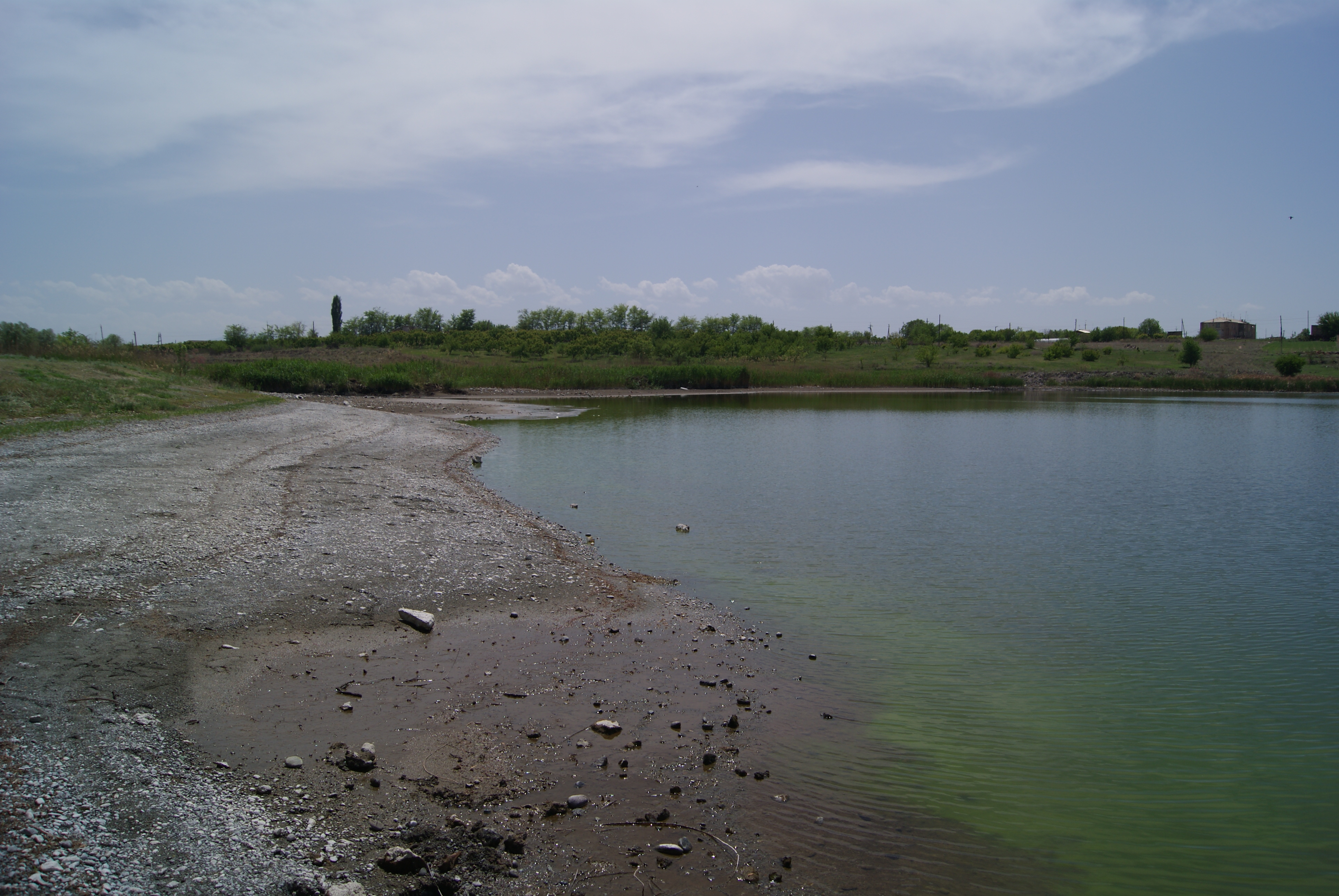 Մեծամոր լիճ, Ակնա լիճ